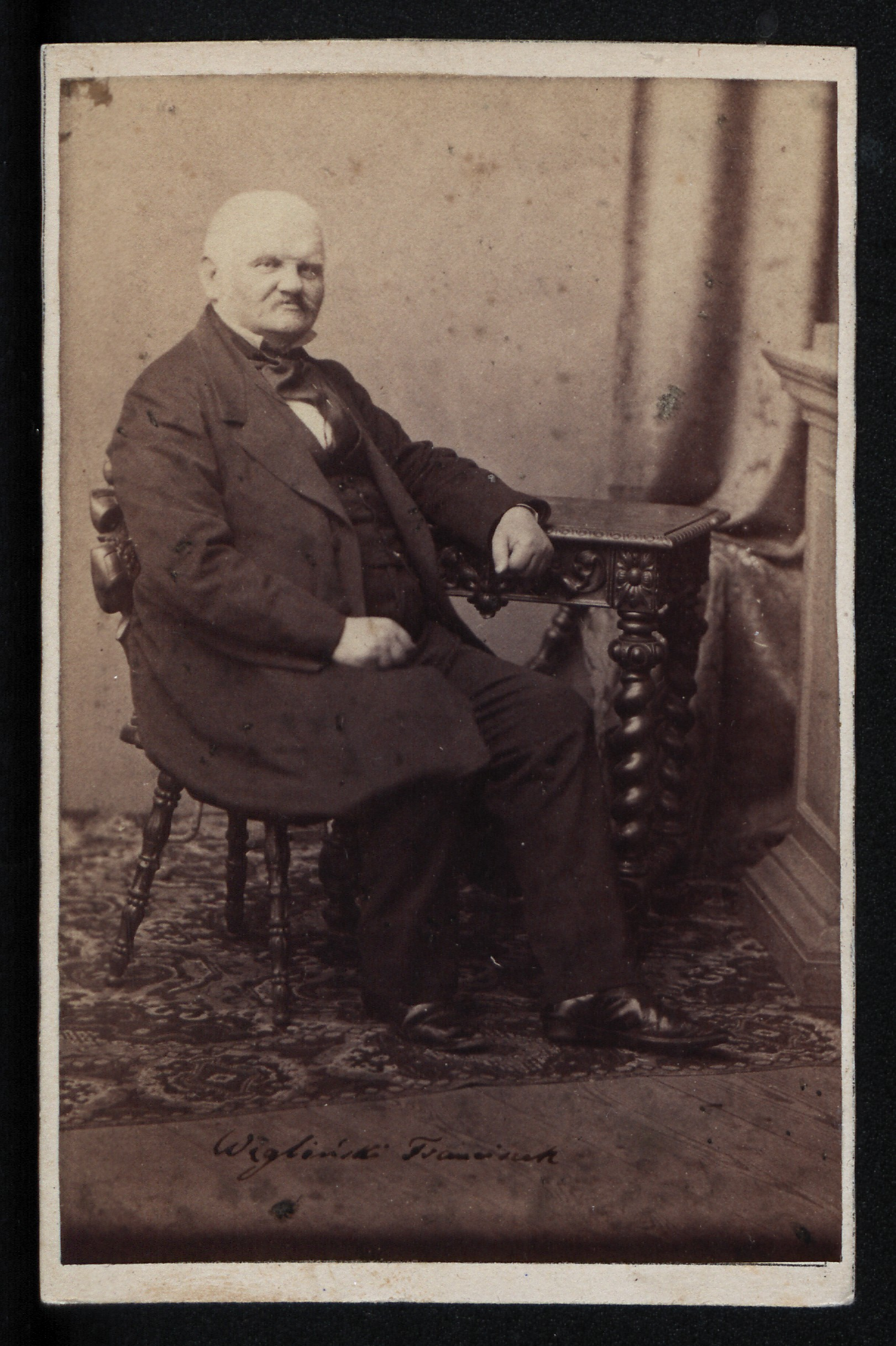 Franciszek Węgleński, ok. 1861 r.